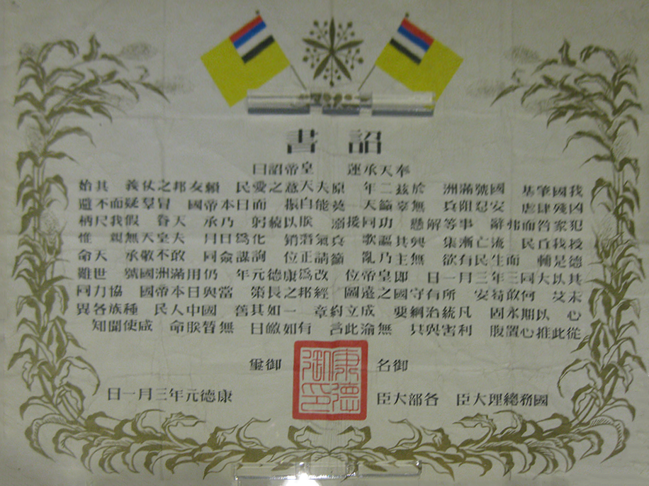 中文（中国大陆）: 伪满皇宫博物院中陈列的康德皇帝溥仪即位诏书